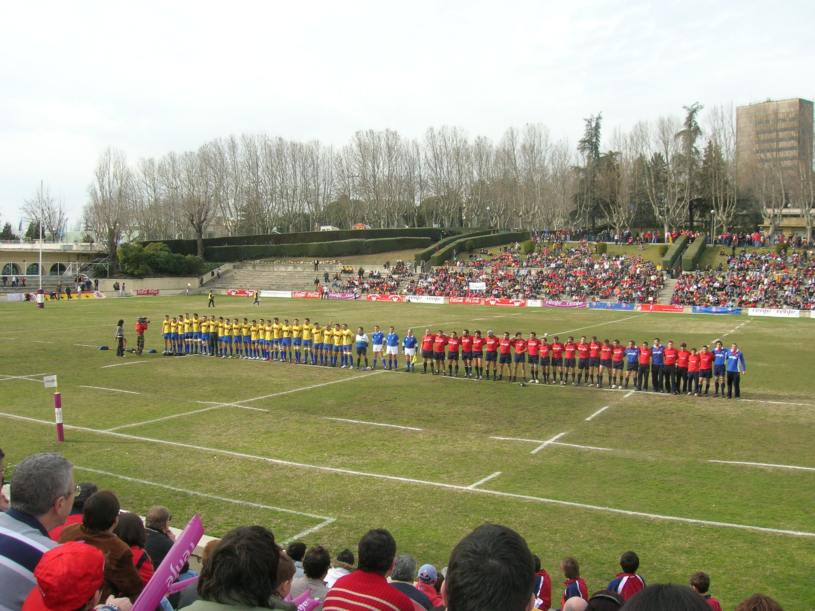 Partido 6 Naciones B entre Rumanía y España